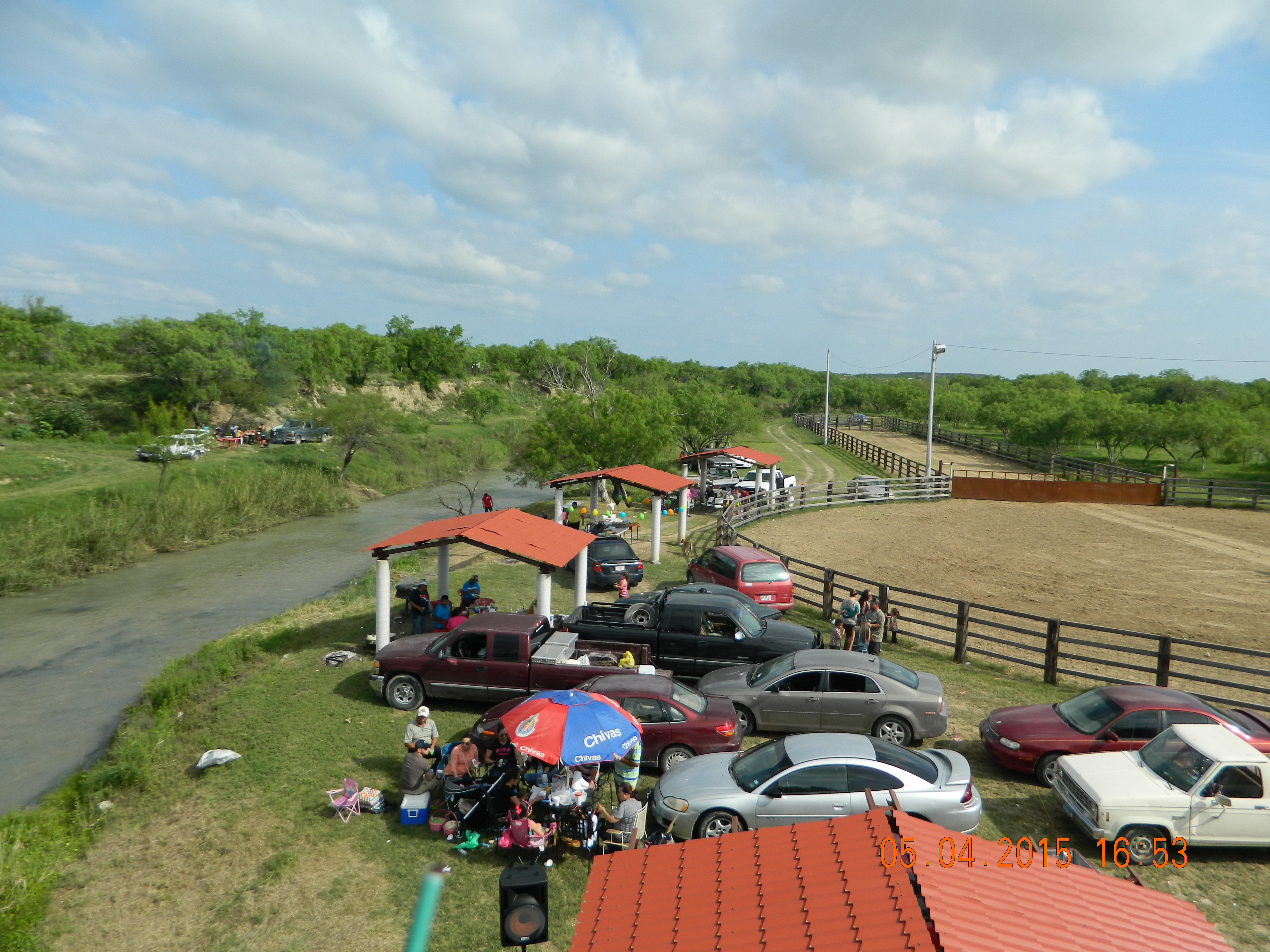 La Paleta, 88390 Cd Mier, Tamps., Mexico